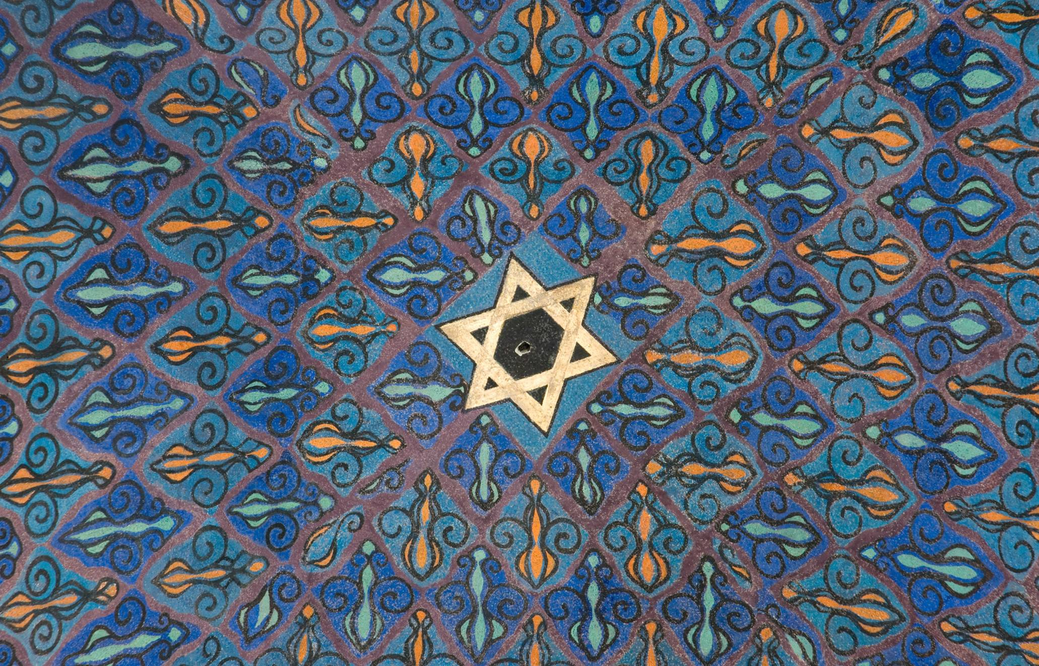 Detail der Spitze der restaurierten Kuppel der Bet Tahara in Olsztyn.